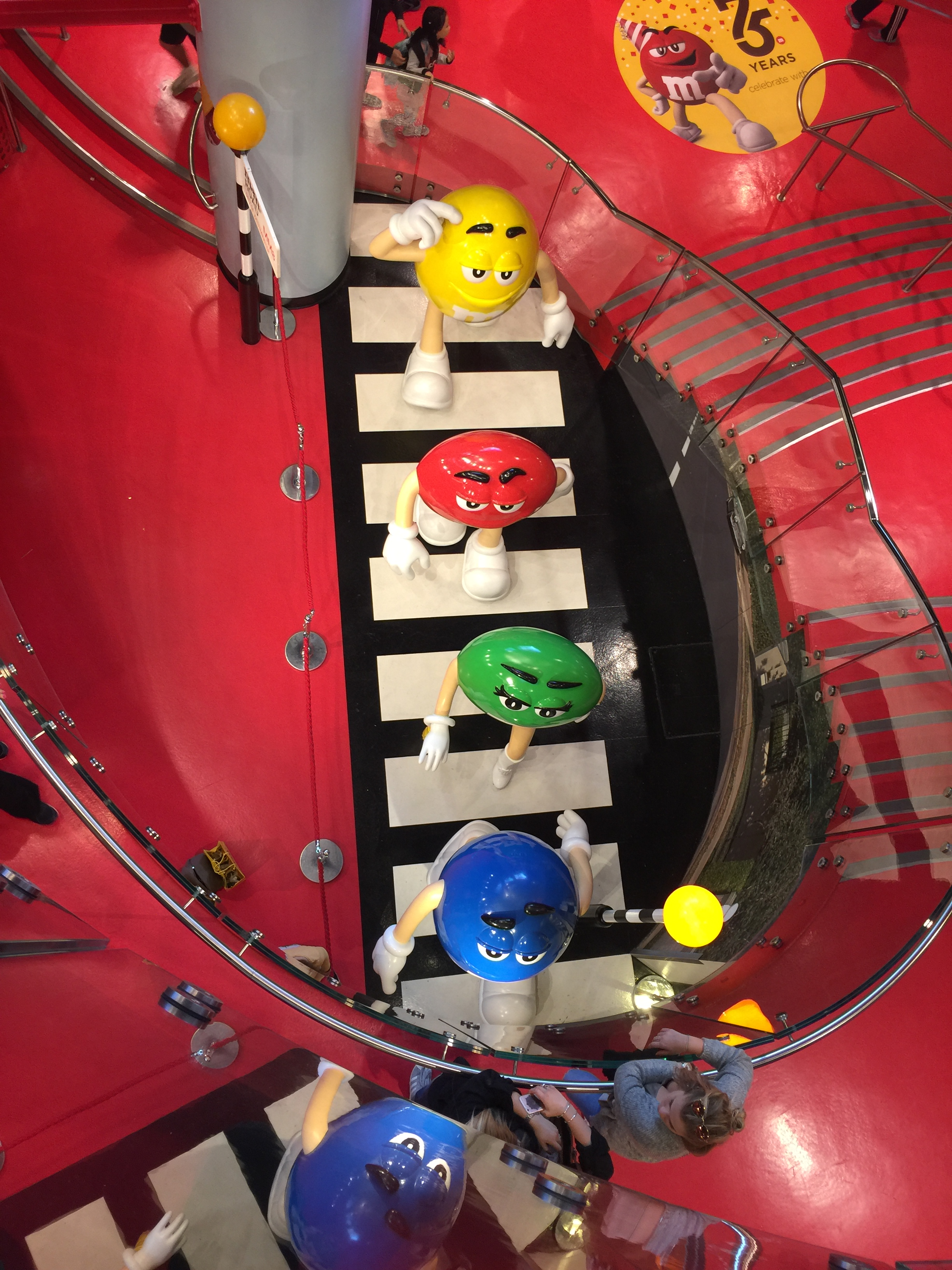 M&M لندن